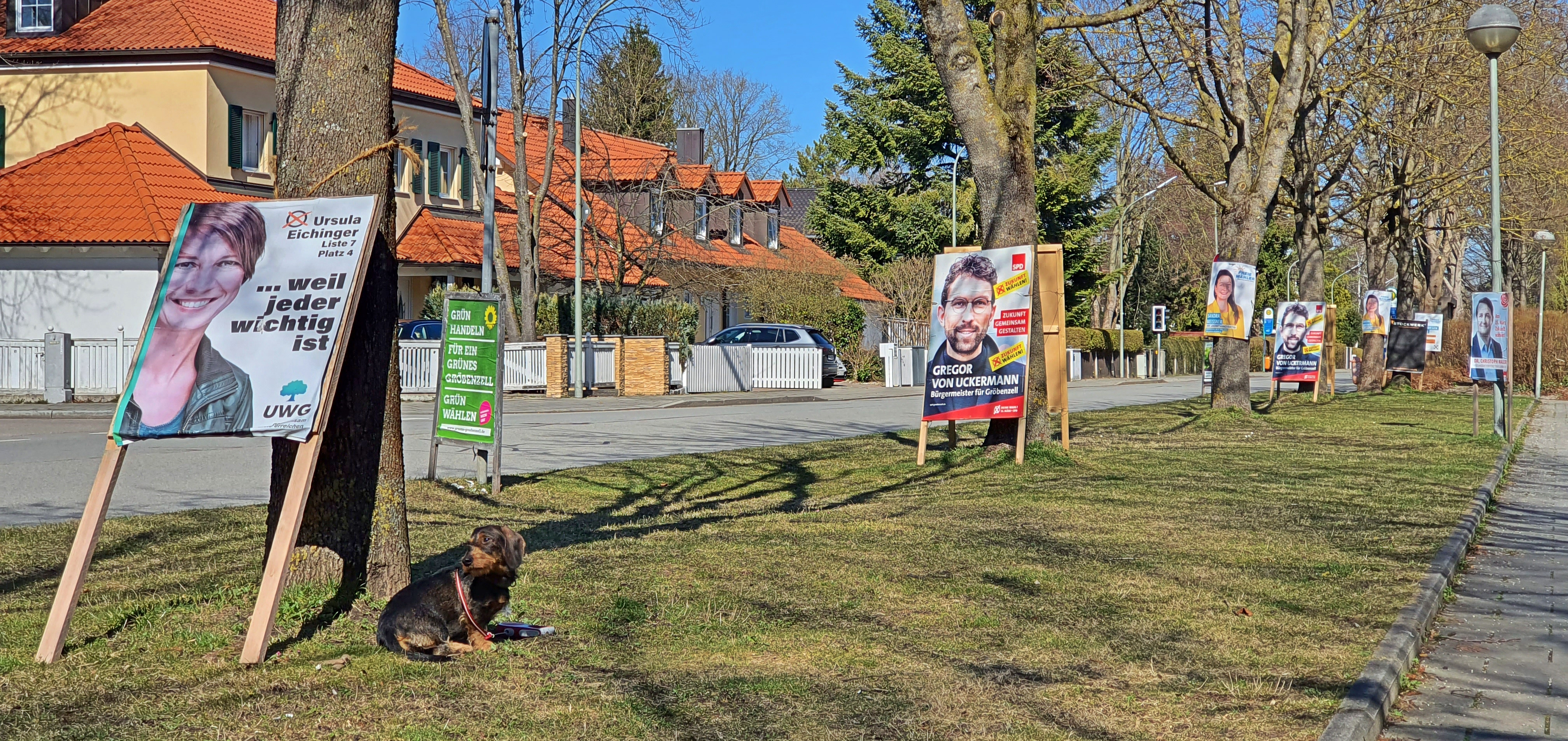 Wahlplakateflutb Gemeinde Gröbenzell